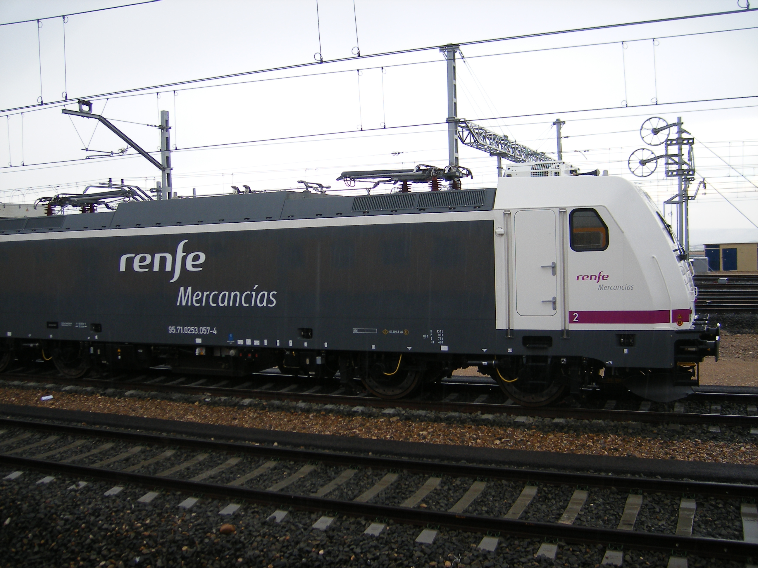 Lomotora eléctrica 253.057 (serie 253) de Renfe Operadora en la estación de Zaragoza-PLAZA (Zaragoza, Aragón). 18 de abril de 2010.